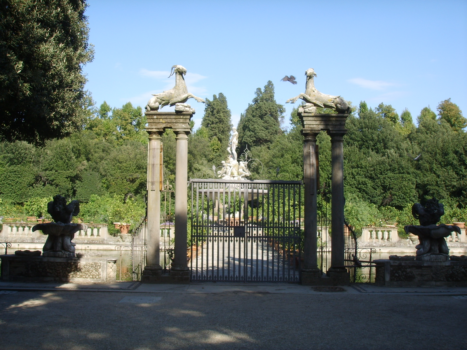 Boboli, isolotto 10 cancello